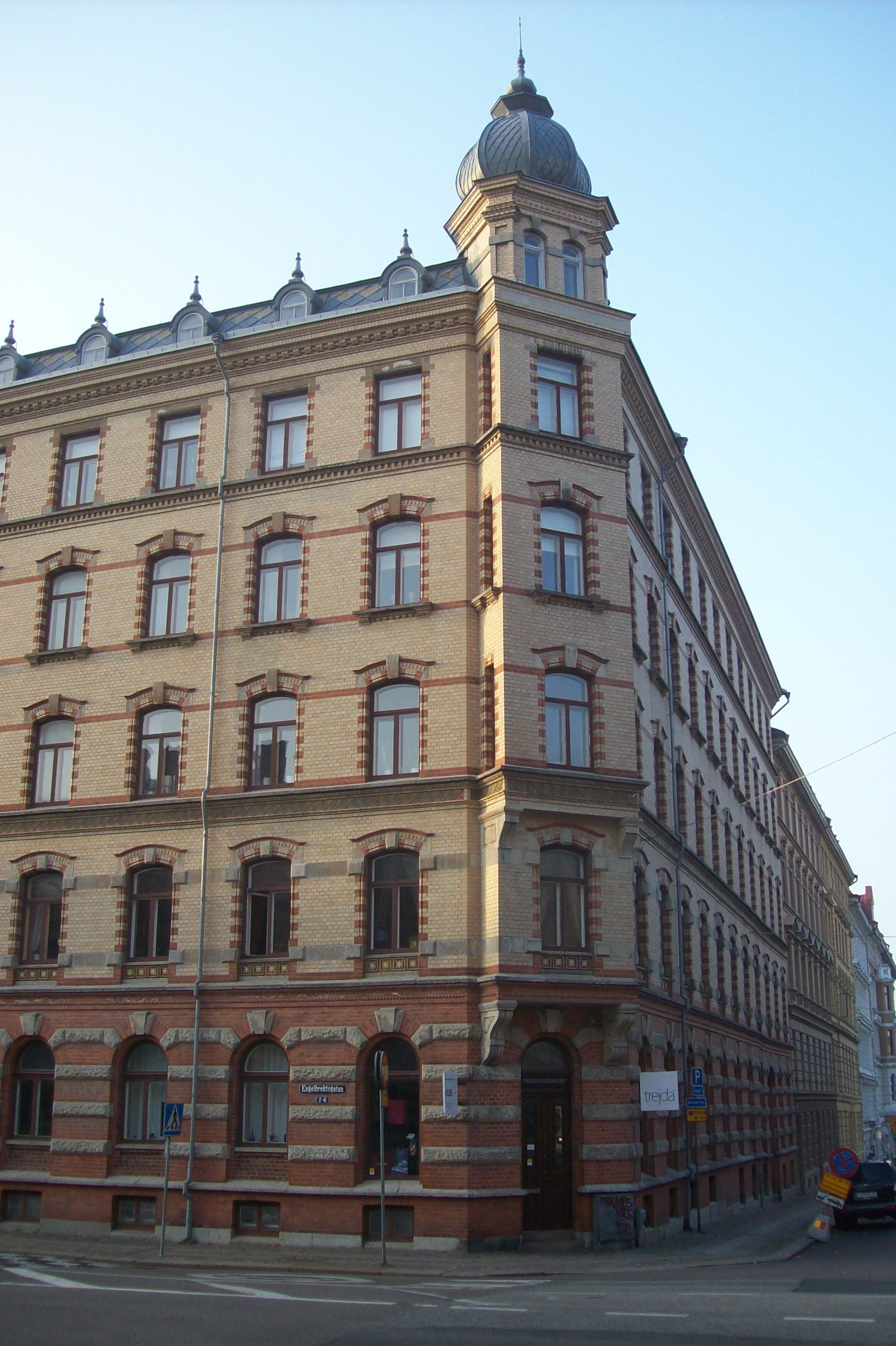 Göteborg Vasastaden 15:17, Kvarteret Granen